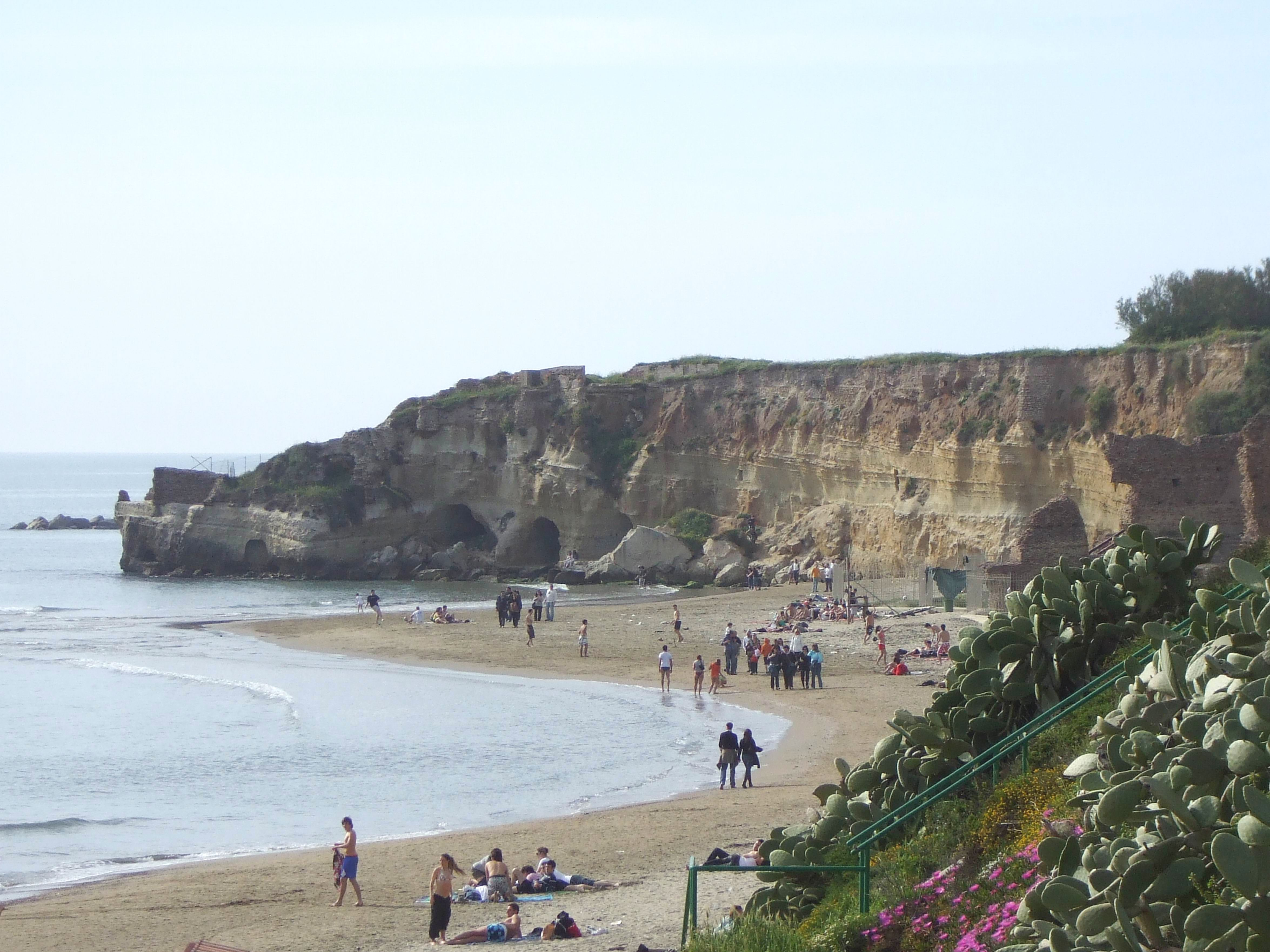 Anzio, la grotta di Nerone